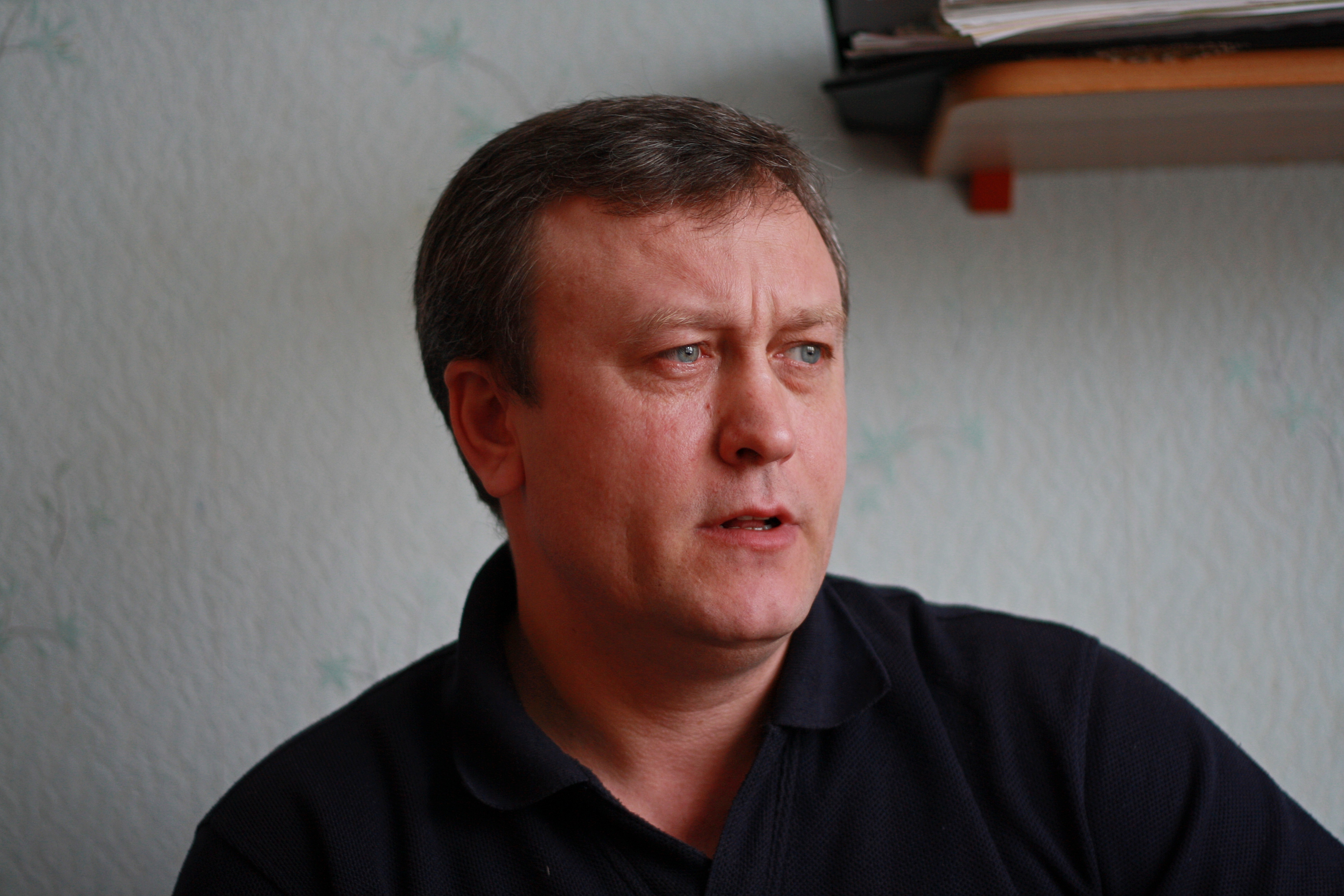 бывший старший участковый уполномоченный милиции Автозаводского УВД Тольятти, майор. Был уволен после видеообращения, выложенного на YouTube, к главе МВД Рашиду Нургалиеву, в котором подверг критике организацию работы органа внутренних дел, где он проходил службу.